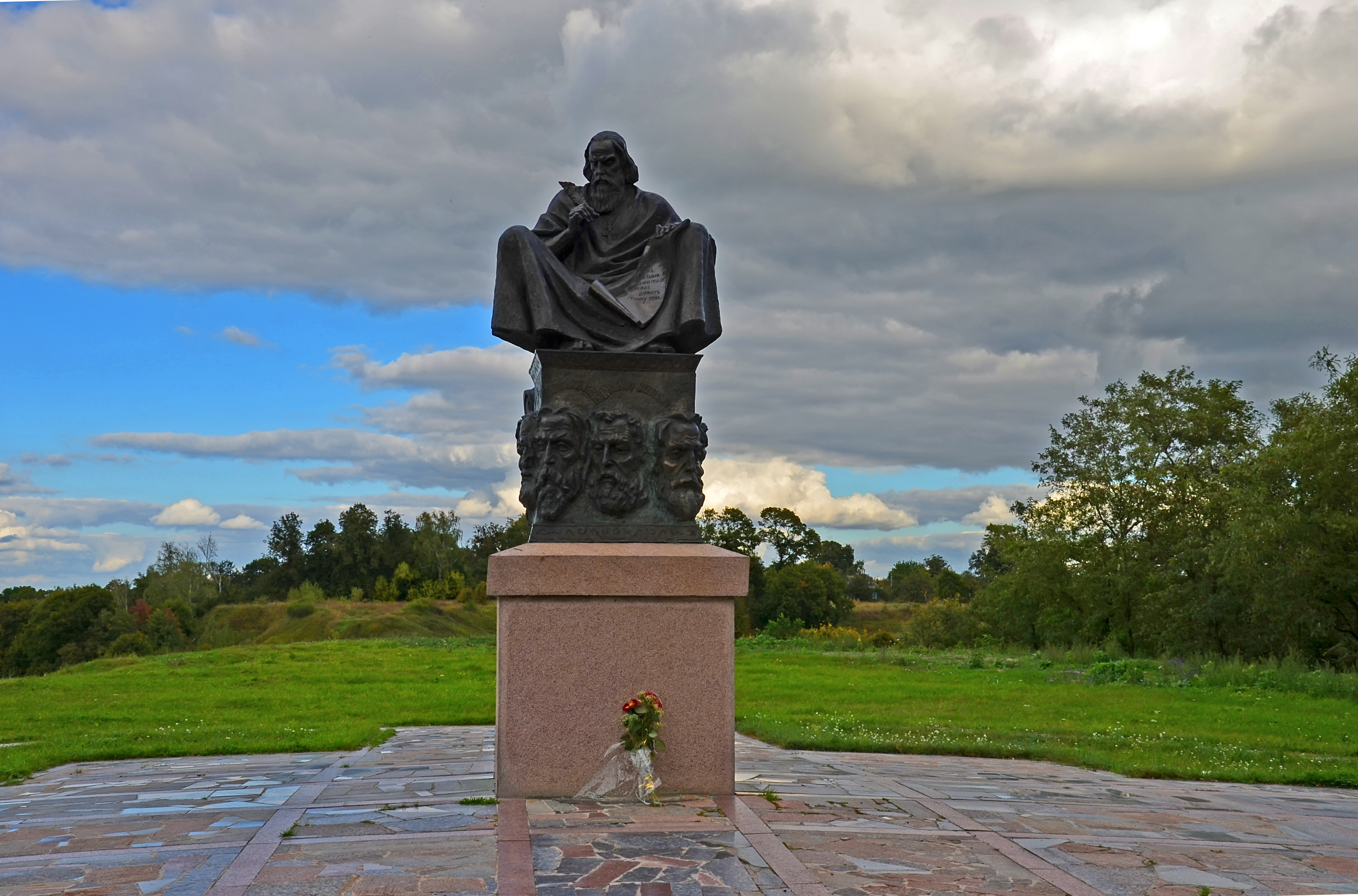 Городище «Замок» (дитинець легендарного міста Любеч, 882), смт Любеч, в центр. частині смт., в ур. Замок